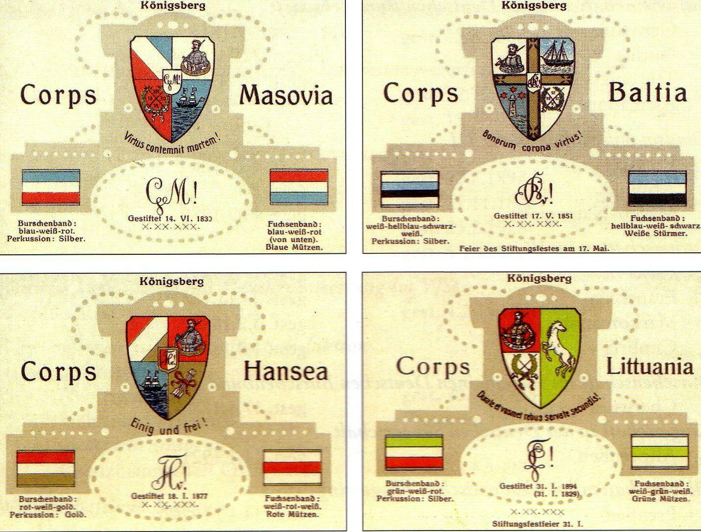 Die vier Kösener Corps im SC zu Königsberg (Preußen), 1894-1936.